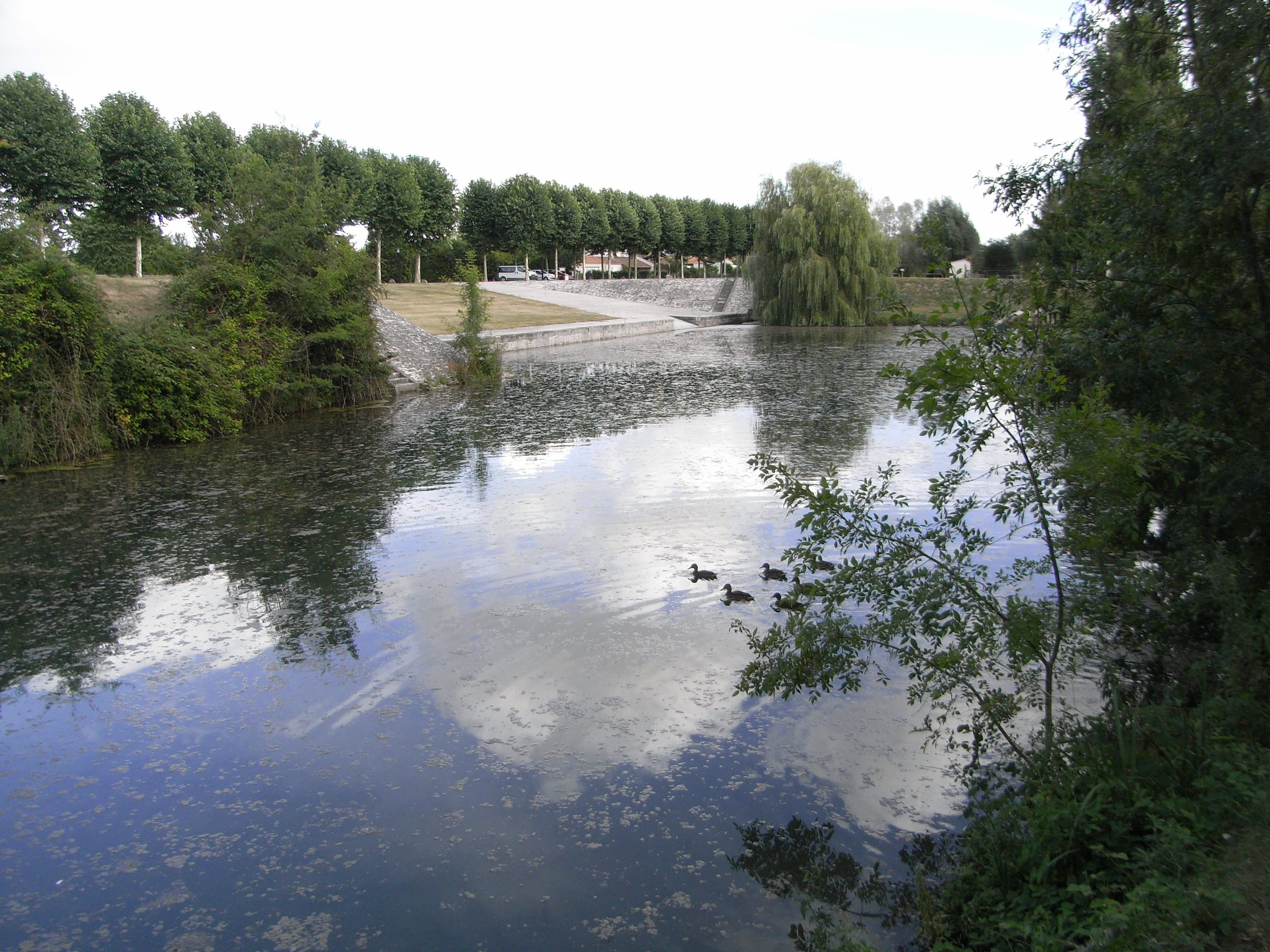 Port de Mauzé sur le Mignon, point de départ du Canal du Mignon en Deux-sèvres (France)